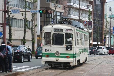 熊本市電1085の画像